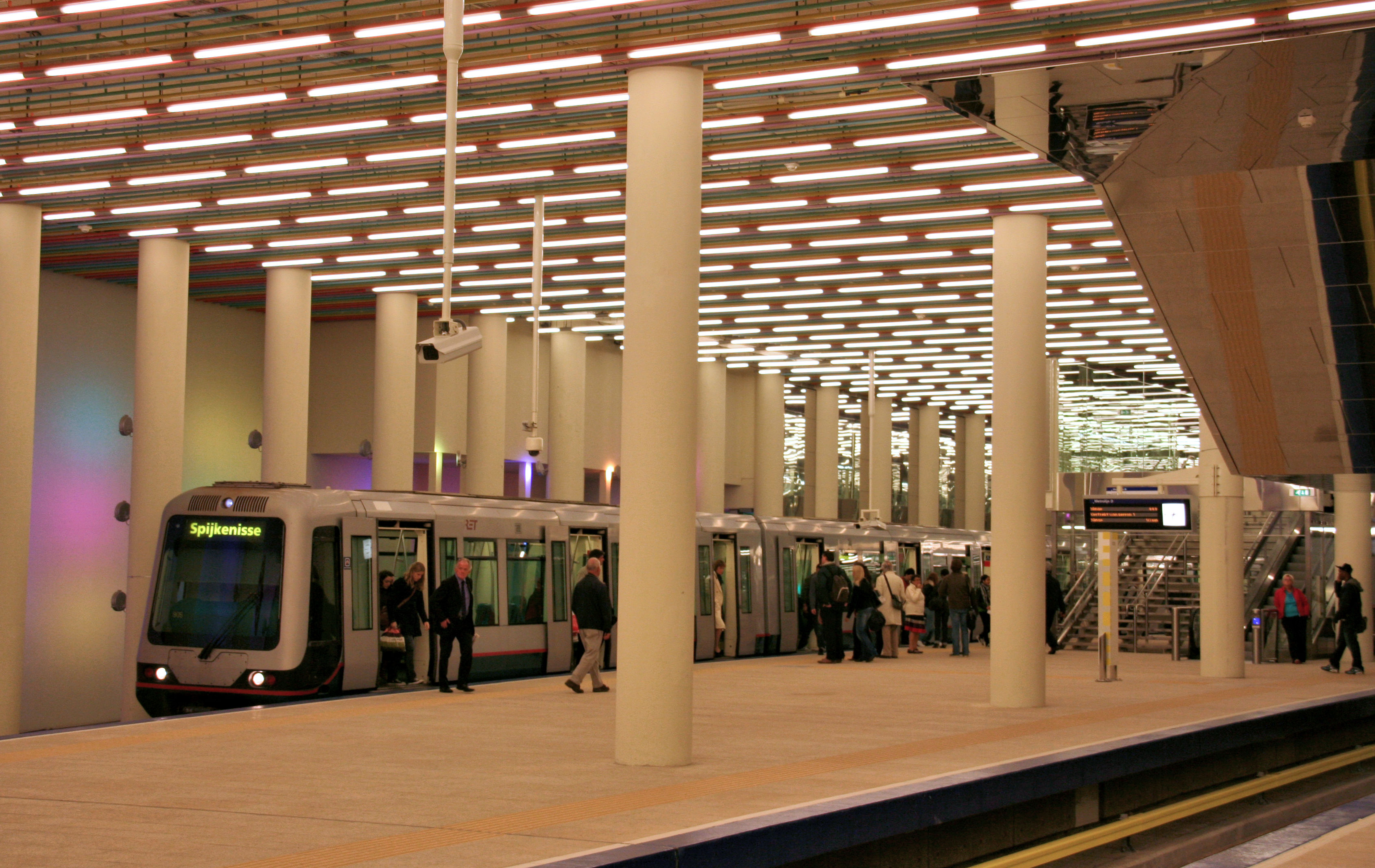 Het nieuwe metrostation Rotterdam Centraal.